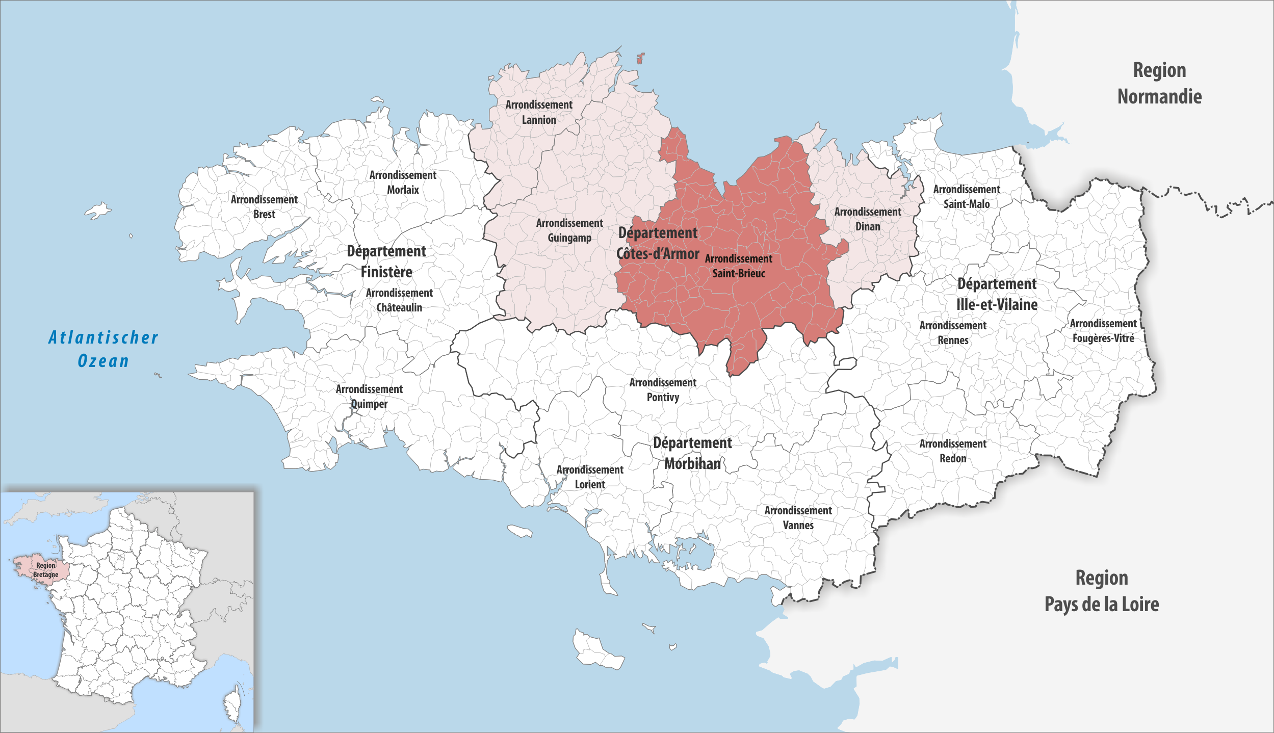 Lage des Arrondissements Saint-Brieuc